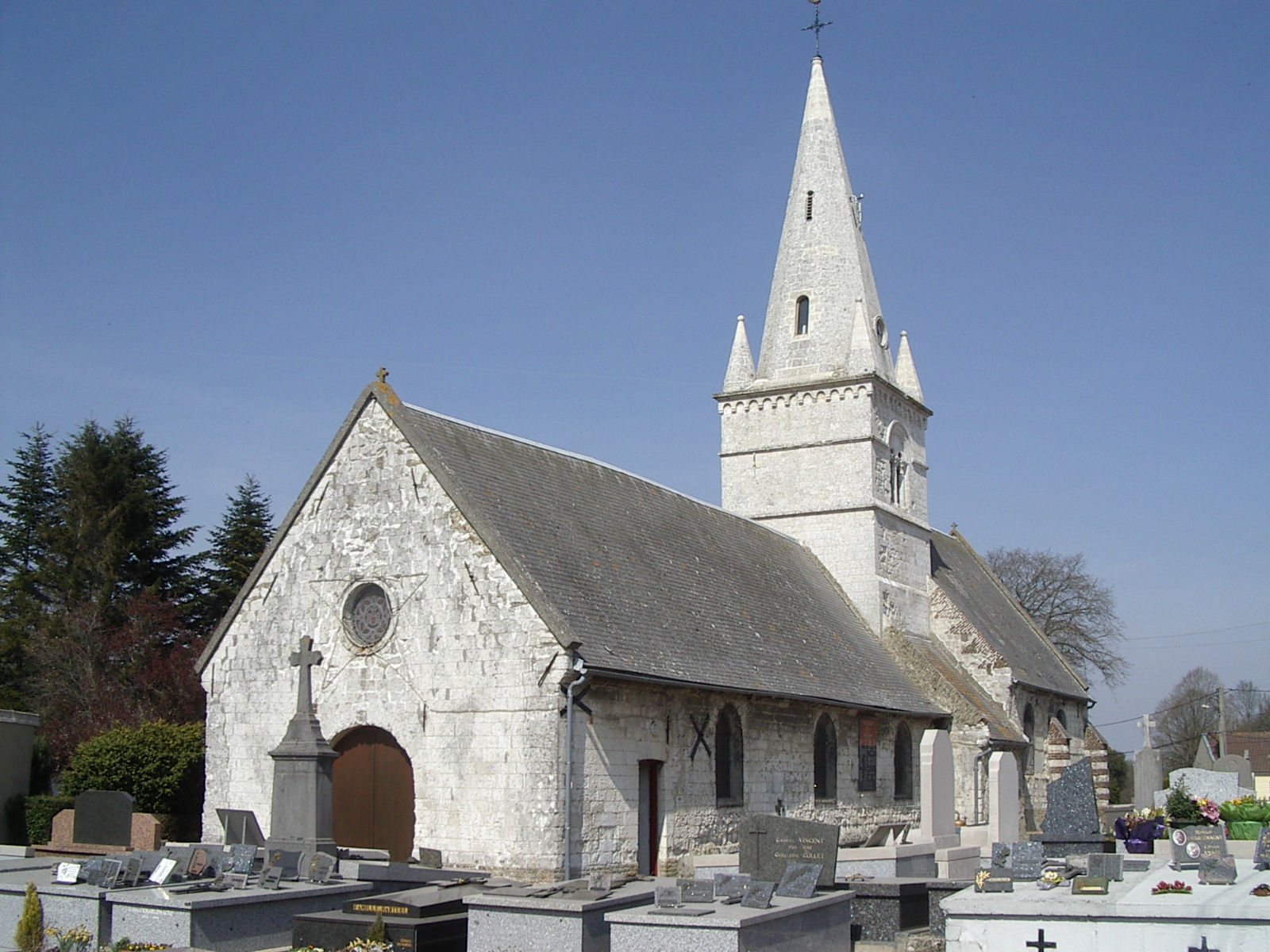 Eglise de Nortbécourt à Mentque-Nortbécourt (Pas-de-Calais, France)